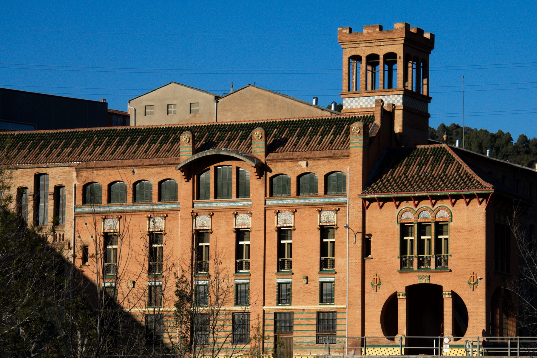 Colònia de la Bauma (Castellbell i el Vilar)